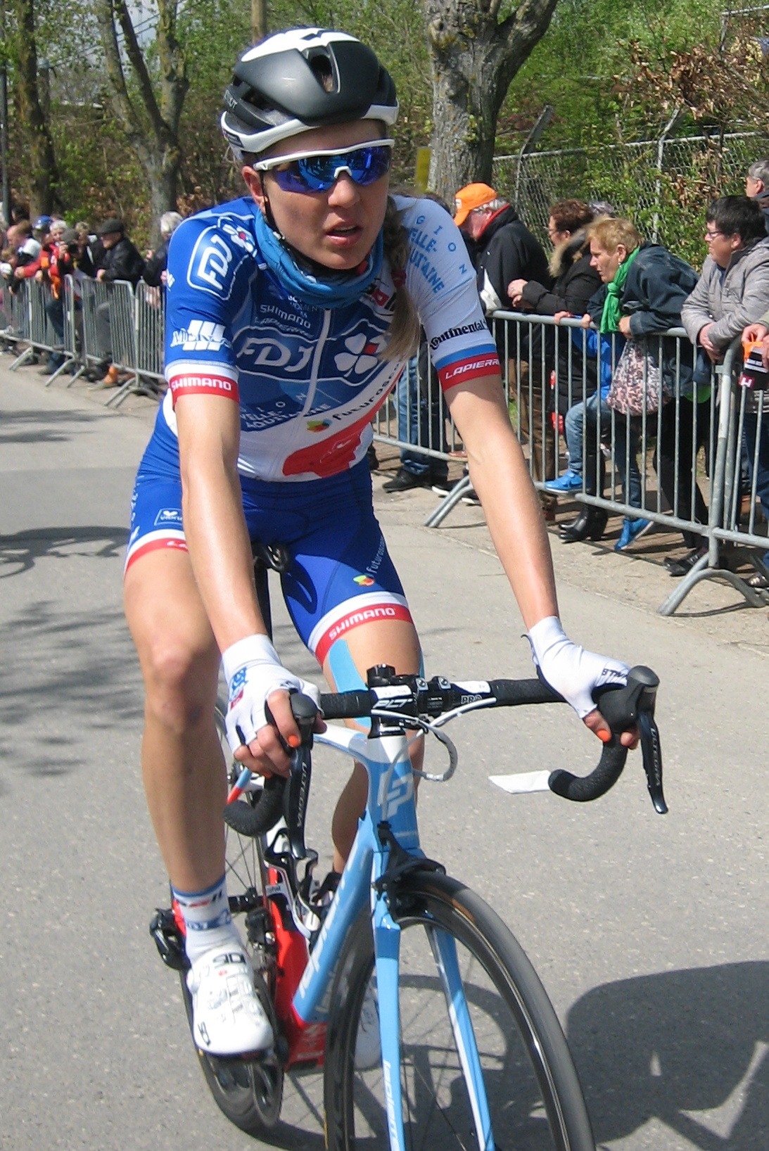 Finish van de Waalse Pijl 2017 in Huy.